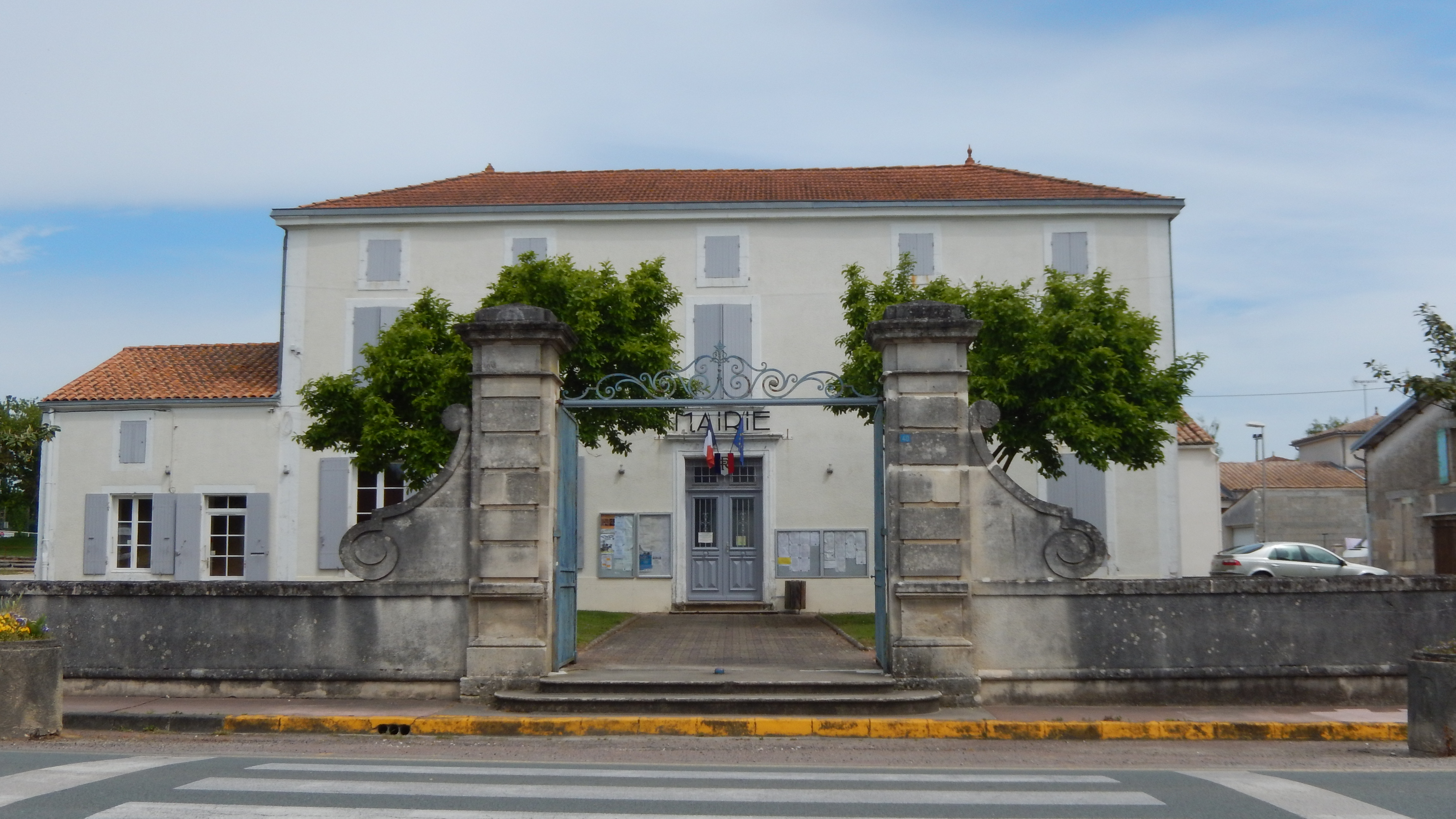 La mairie de Lussant (Charente-Maritime, France).